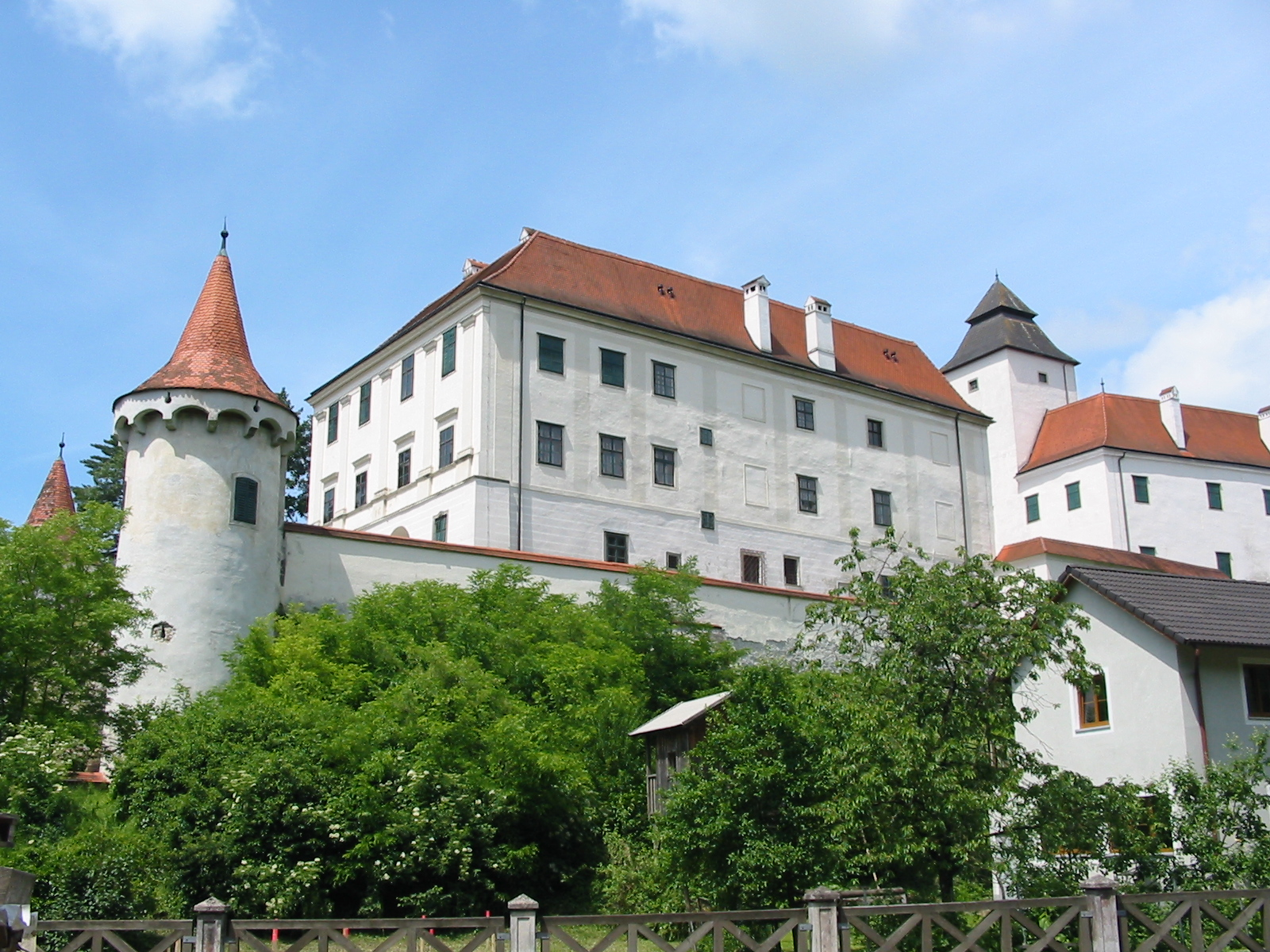 Südöstliche Seite von Schloss Seisenegg.